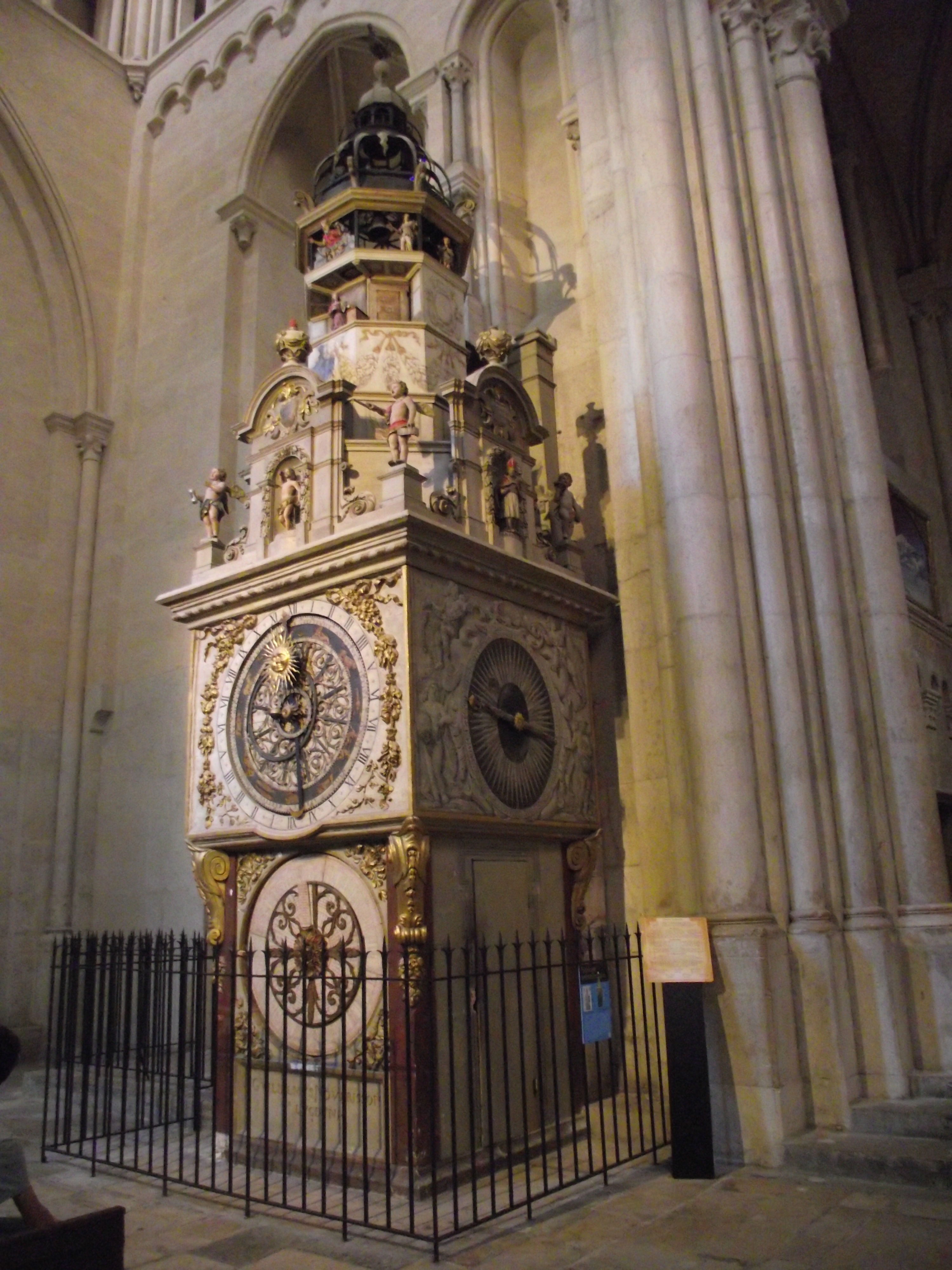 Cathédrale de Lyon, Horloge astronomique